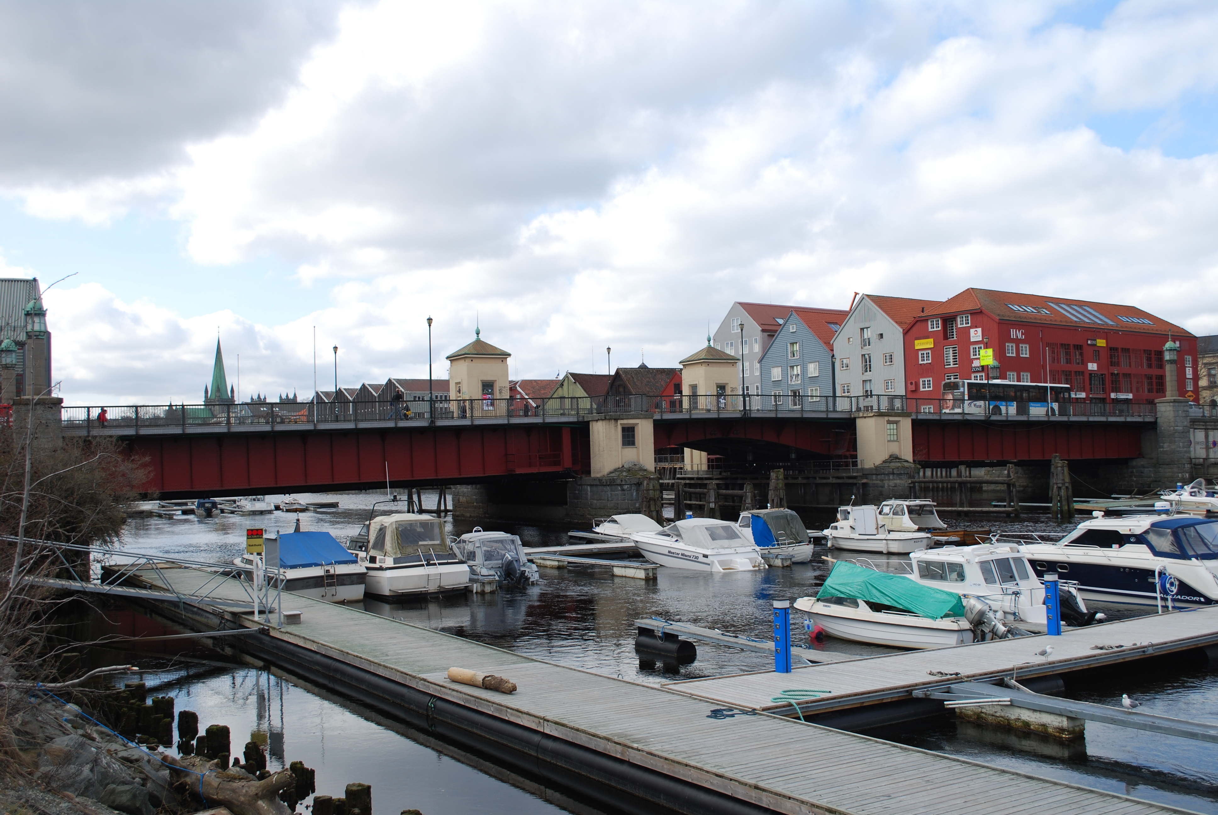 Bakke bru i Trondheim sett mot sørlig retning.